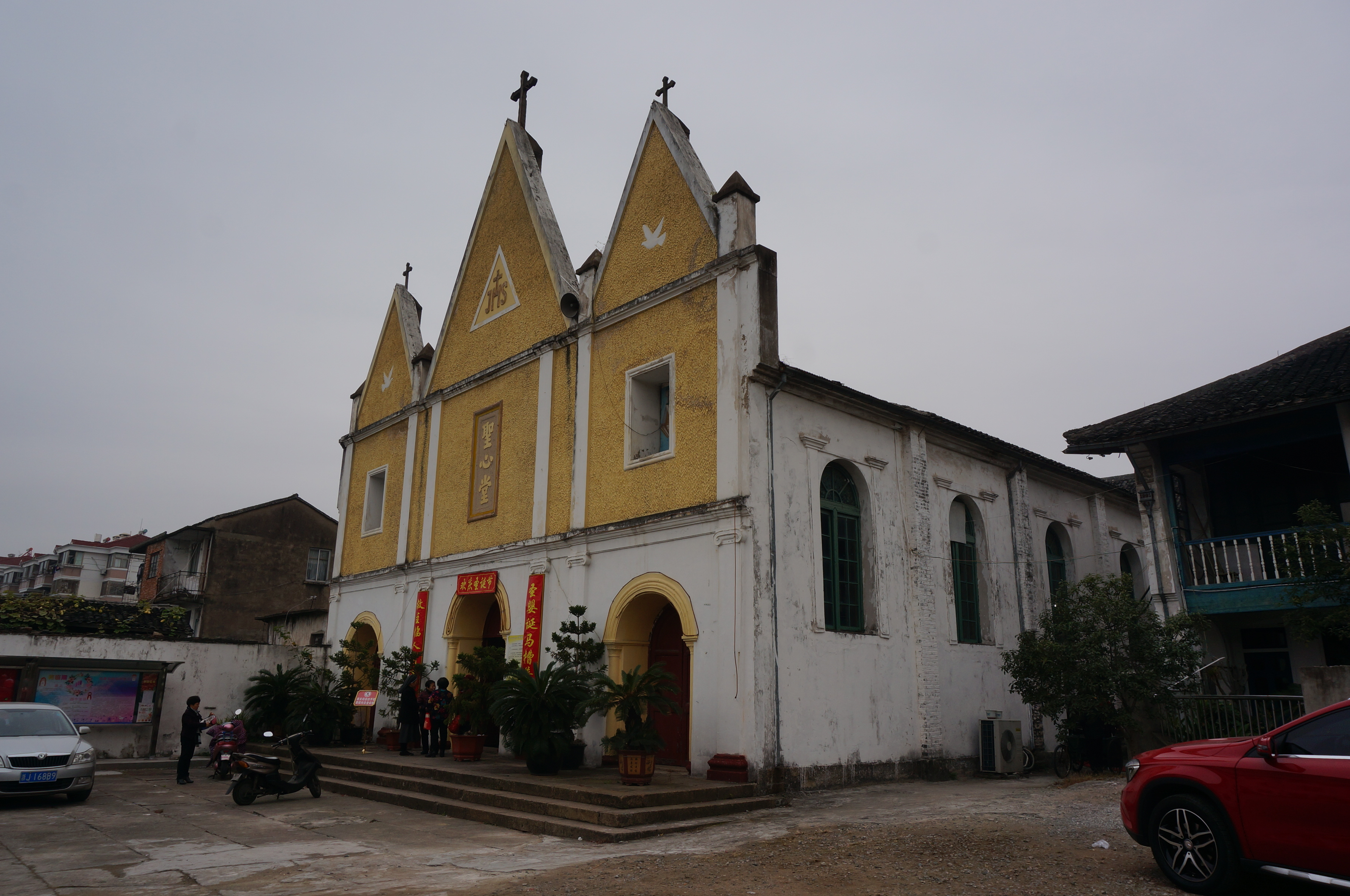 台州海门耶稣圣心主教座堂，大堂东南面。